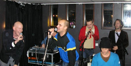 Moder jords massiva live at Club Utopi in Skövde Sweden